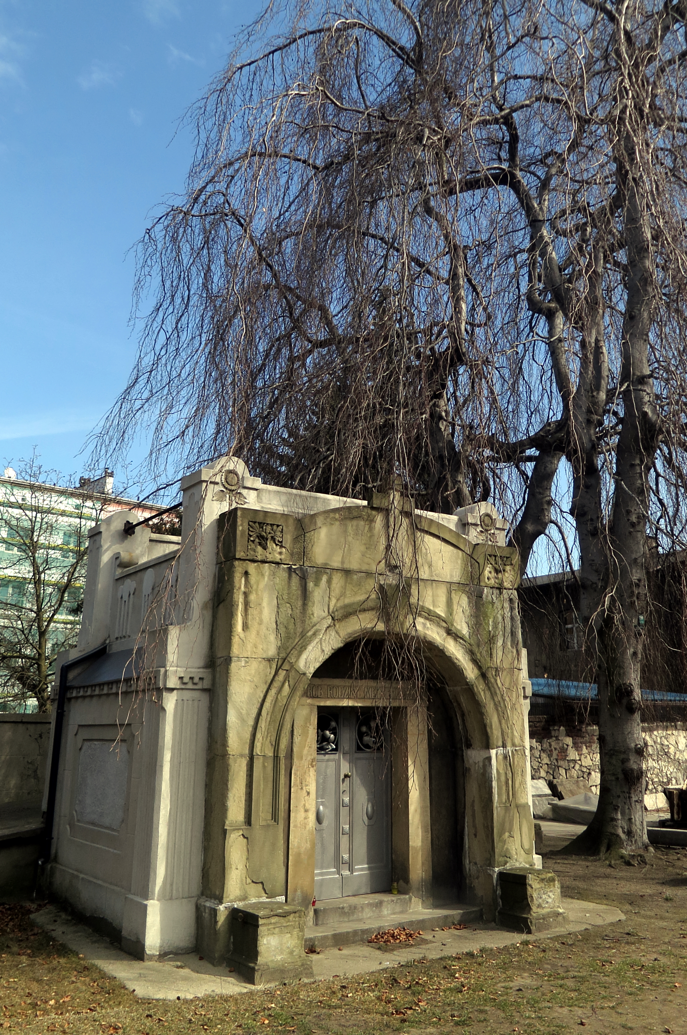 Sosnowiec, grobowiec rodziny Meyerholdów, 1906